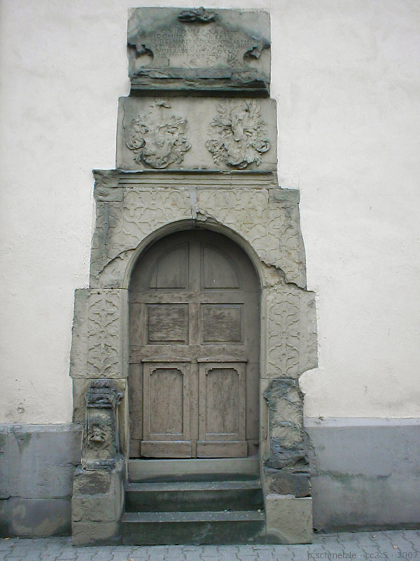 Renaissance-Portal am Rentamt in Sulzfeld (Baden), Baden-Württemberg, Deutschland